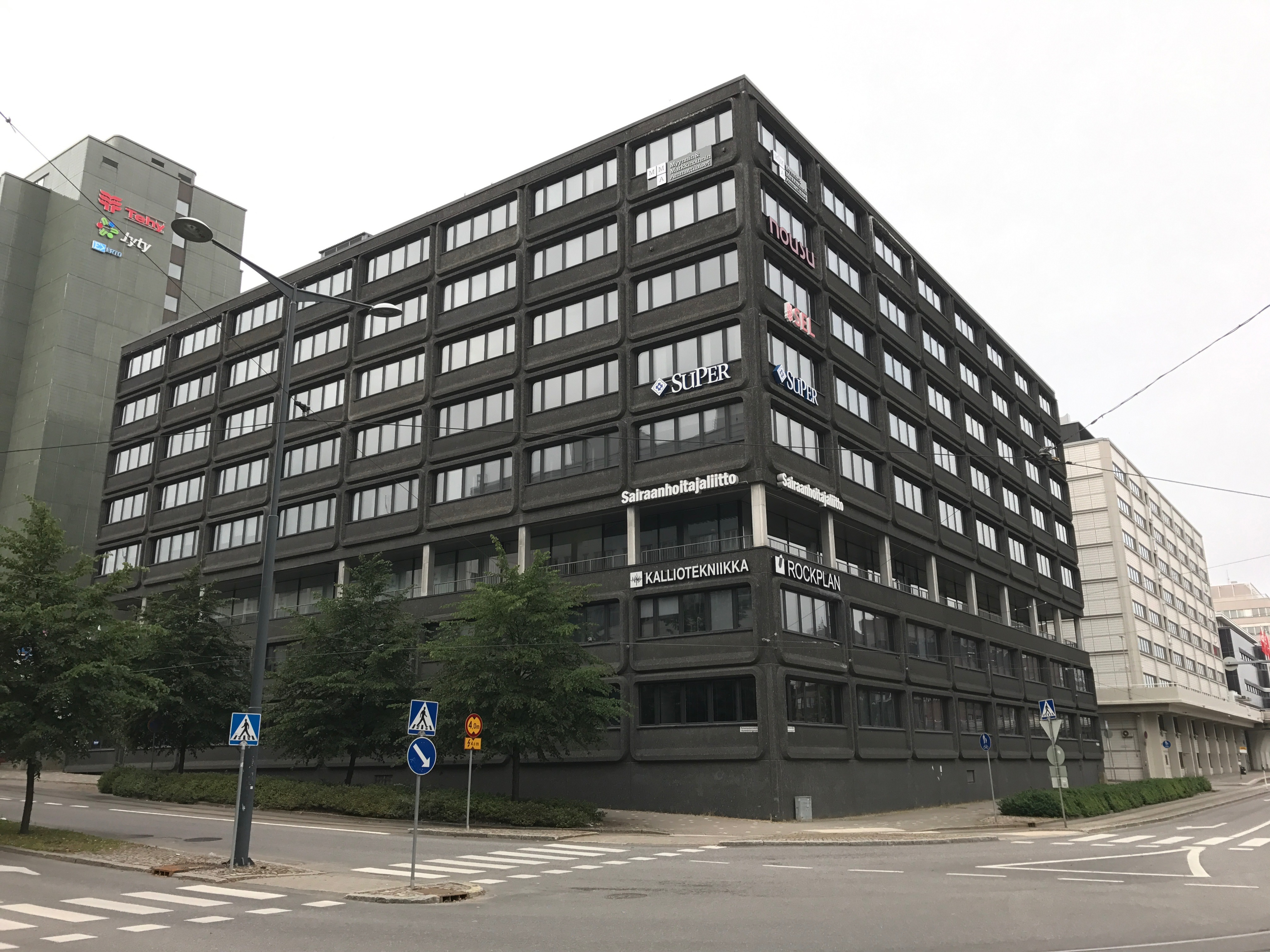 Toimistorakennus Helsingin Itä-Pasilassa, osoitteessa Ratamestarinkatu 12.